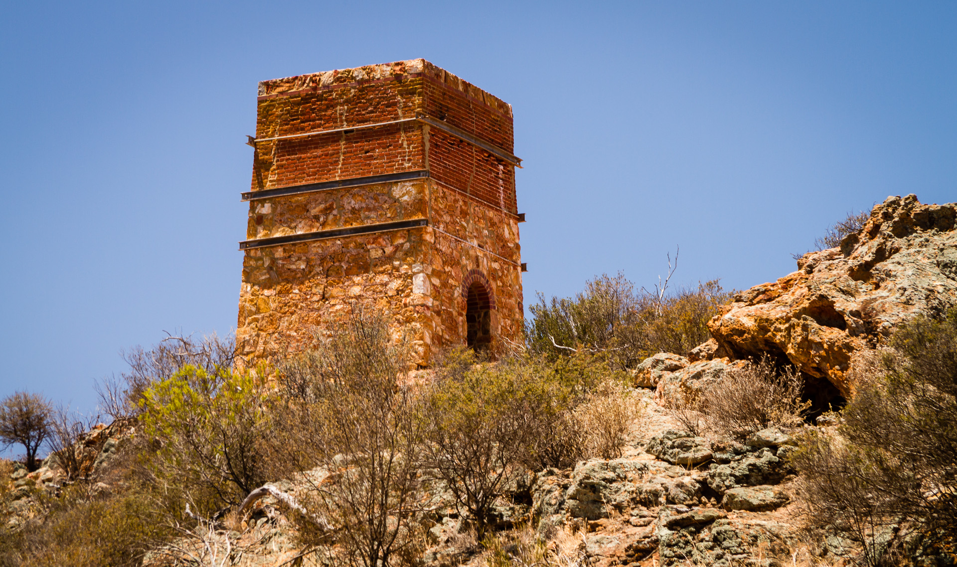 Warribano Chimney